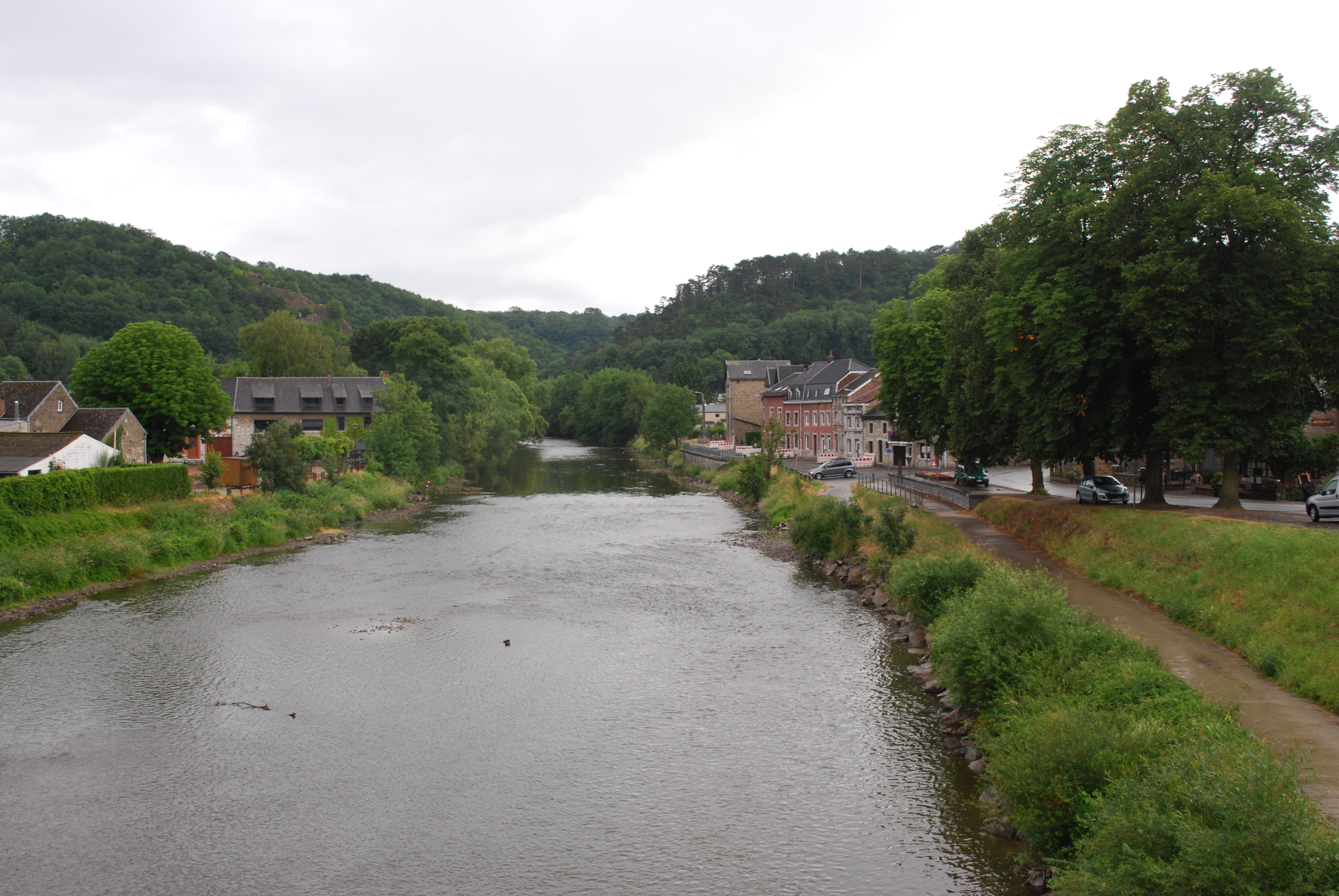 Comblain-la-Tour : vue sur l'Ourthe vers l'amont et la rue de Fairon sur la rive gauche.